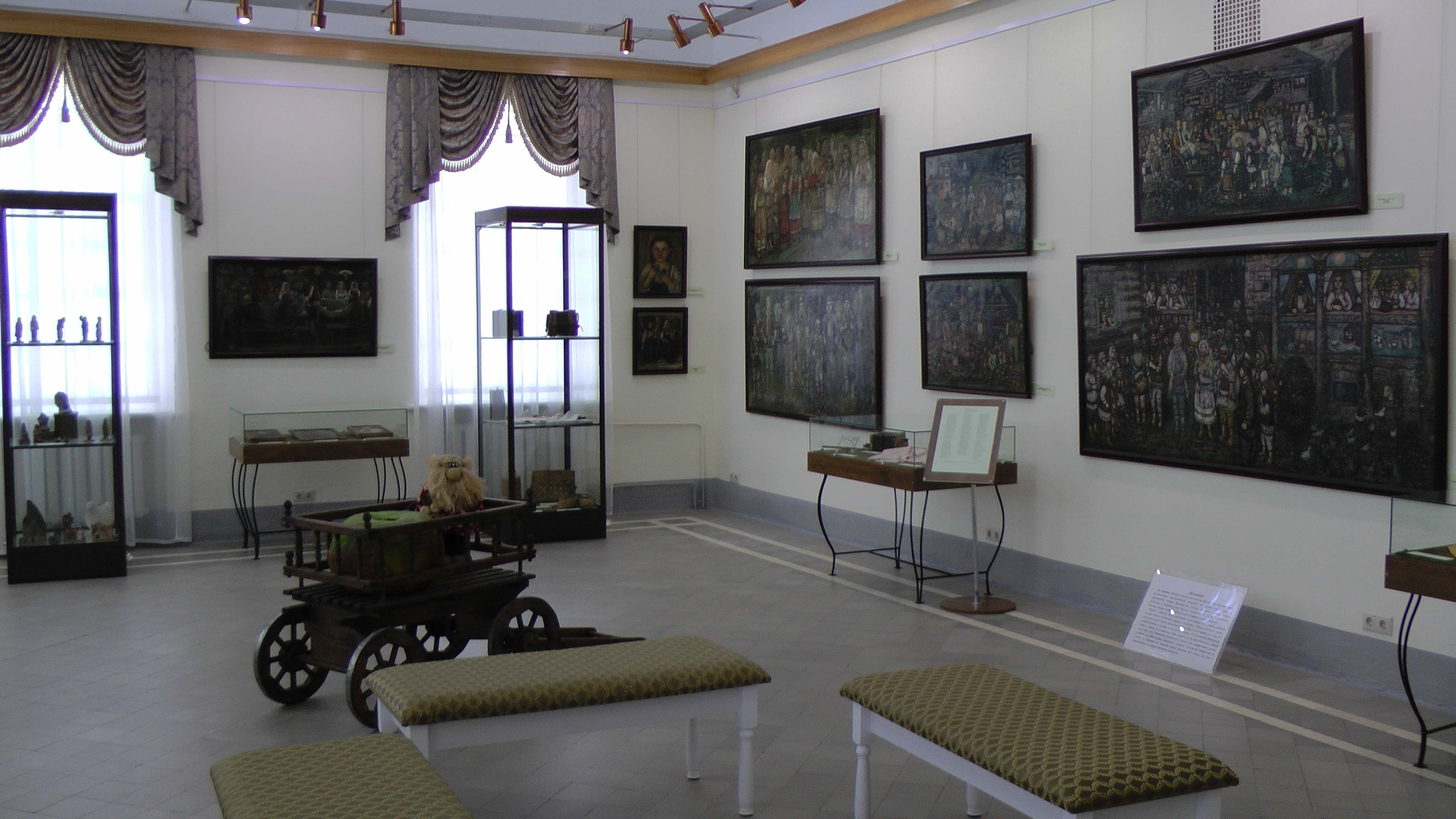 Зал Честнякова в Романовском музее